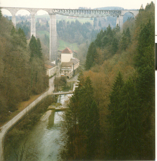 Der Sitterviadukt der Südostbahn (SOB), 99 m über dem Wasserspiegel, ist eine kombinierte Steinbogen-Stahlfachwerkbrücke